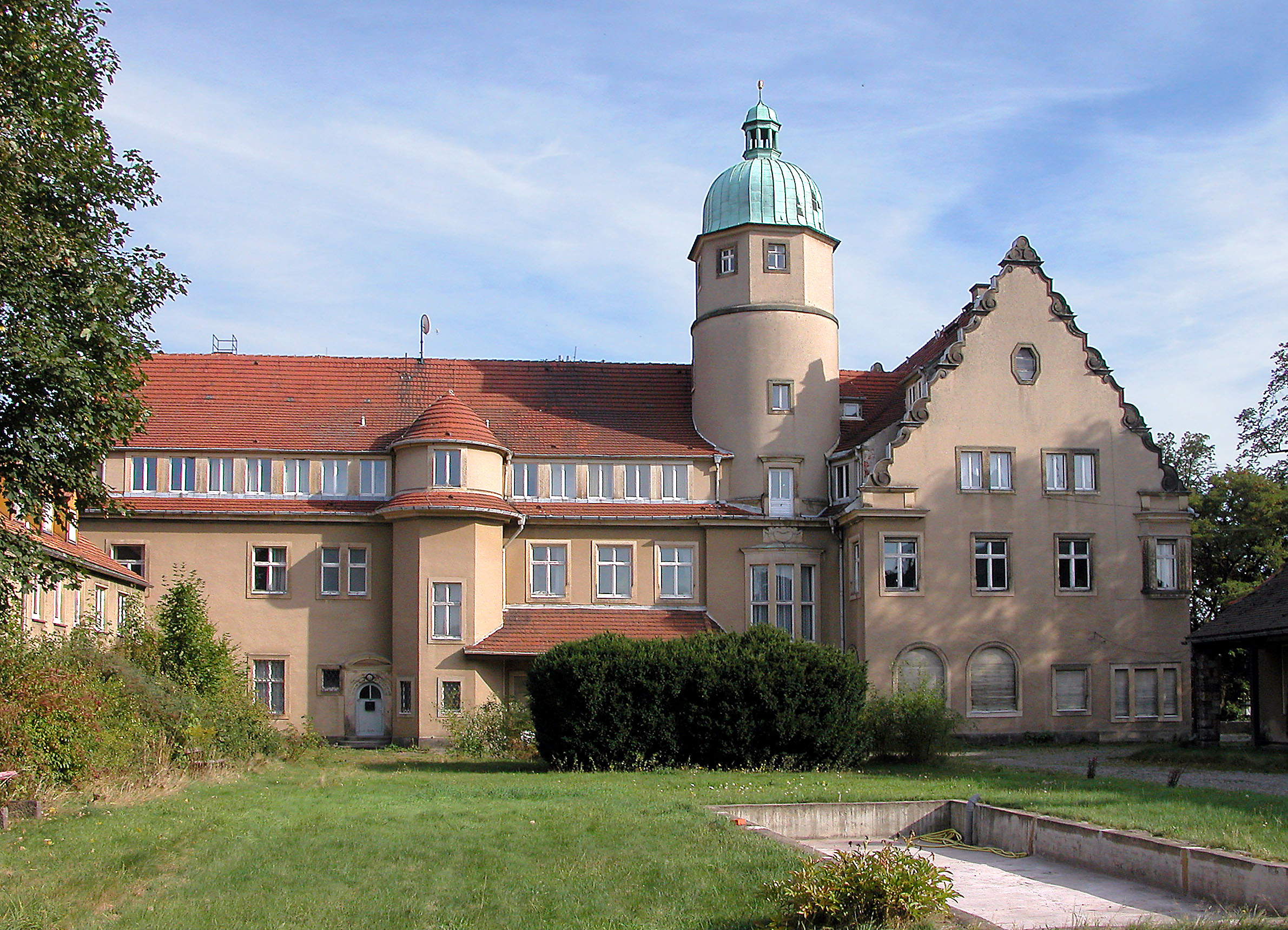 25.09.2003 01833 Helmsdorf (Stolpen), Wilschdorfer Straße 8 (GMP: 51.038387,14.029053): Schloß, erbaut von 1907 bis 1909 nach Plänen der Dresdner Architekten Lossow & Kühne. Das Renaissanceportal wurde vom Vorgängerbau übernommen. Es trägt die Jahreszahl 1595 und das Wappen des damaligen Amtschössers von Lohmen. Ab 1933 wurde das Schloß als Wohnheim einer Meisterschule für das Bäckerei- und Konditoreigewerbe genutz. In der DDR-Zeit war das Schloß Handwerker-Erholungsheim. Seit 1999 in Privatbesitz wurde es seit 2001 zur Schloß Helmsdorf-Künstler- und Kulturvereinigung ausgebaut. Hofseite von Westen. [DSCN]20030925420DR.JPG(c)Blobelt